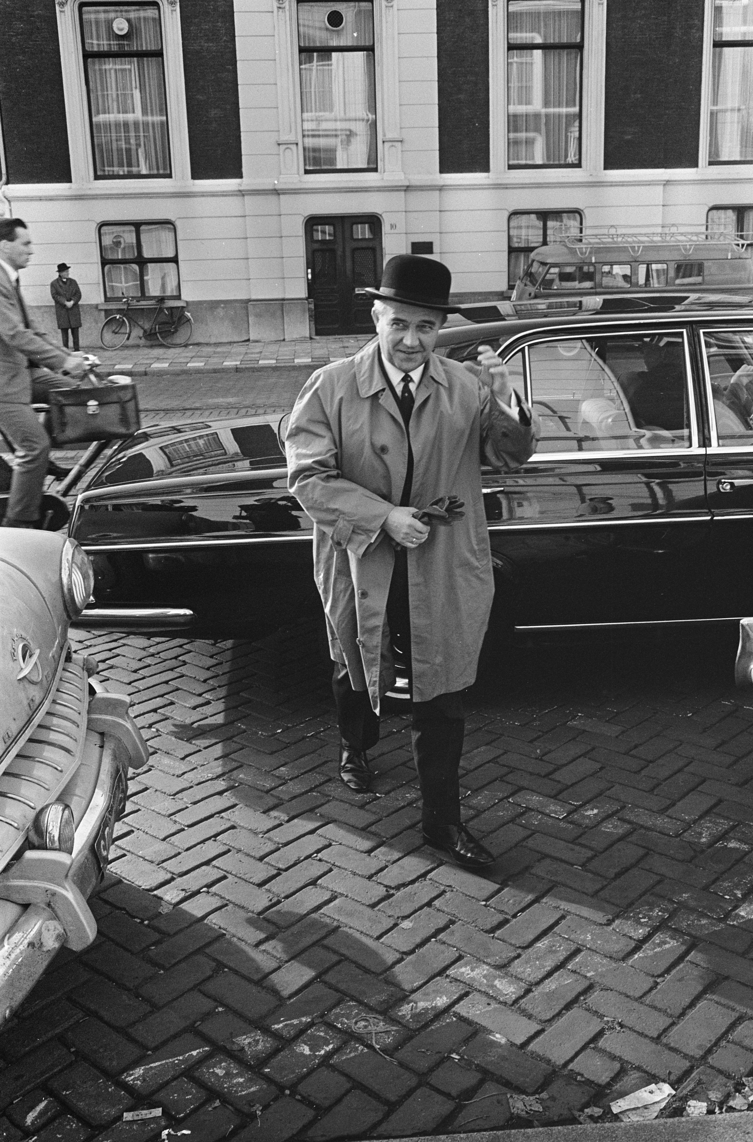 Collectie / Archief : Fotocollectie Anefo Reportage / Serie : Kabinetscrisis 1966: De nacht van Schmelzer Beschrijving : Minister van Defensie Piet de Jong (KVP) arriveert bij het kantoor van formateur Drs. W.K.N. (Norbert) Schmelzer (KVP) Datum : 27 oktober 1966 Locatie : Den Haag, Zuid-Holland Trefwoorden : kabinetscrises, ministers, politiek Persoonsnaam : Jong, P.J.S. de Fotograaf : Fotograaf Onbekend / Anefo Auteursrechthebbende : Nationaal Archief Materiaalsoort : Negatief (zwart/wit) Nummer archiefinventaris : bekijk toegang 2.24.01.05 Bestanddeelnummer : 919-7272